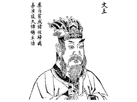 El Rey Wen Zhou (1152- 1056 a. C.) fue Rey del Zhou durante finales de la dinastía Shang en la antigua China. Aunque fue su hijo Wu que conquistó a los Shang tras la batalla de Muye, el rey Wen fue honrado como el fundador de la dinastía Zhou.2 Algunos lo consideran el primer héroe épico de la historia China.3 Era conocido por gobernar a través de la virtud y la bondad.